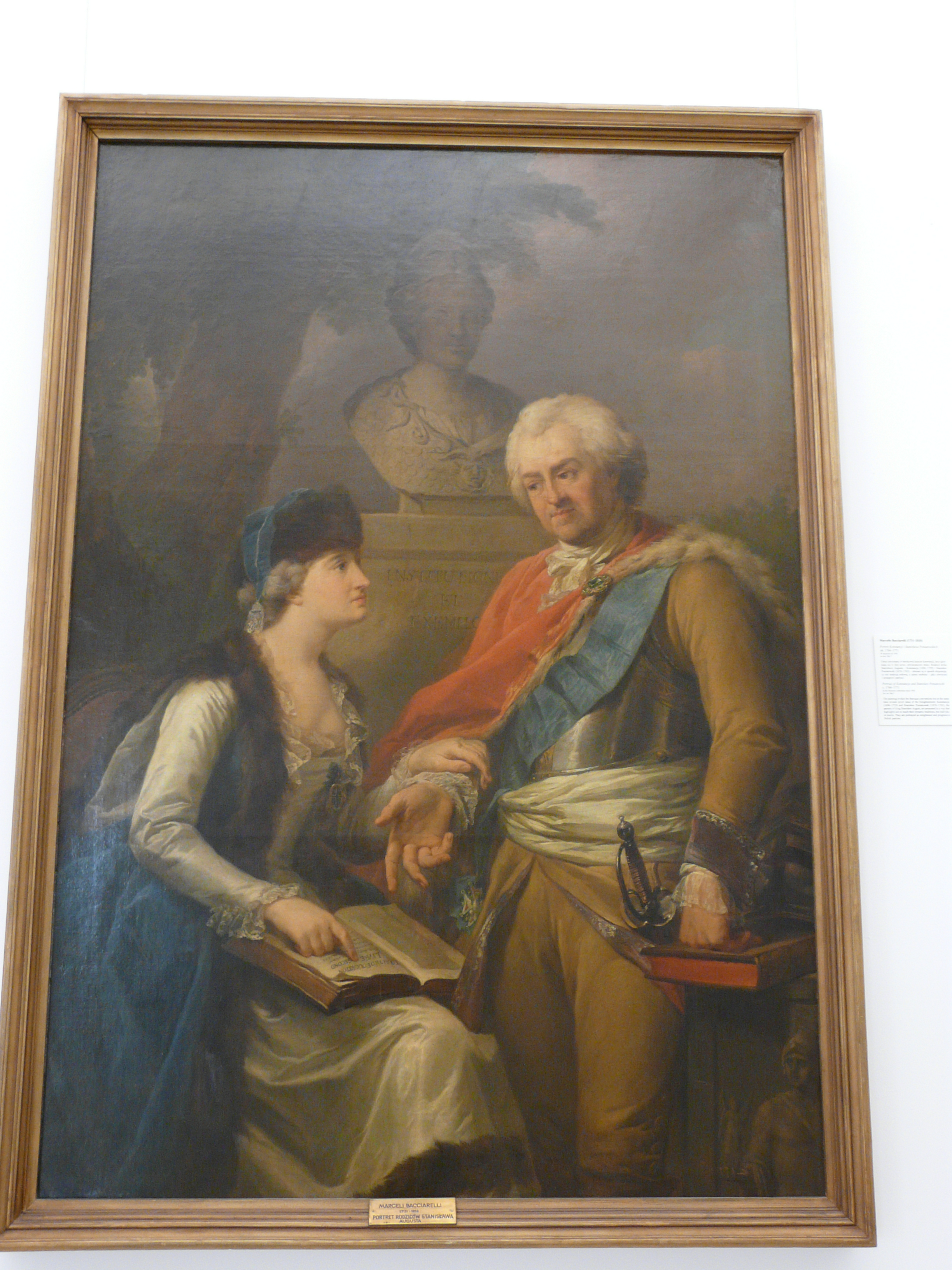 Portrait of Stanisław Poniatowski and Konstancja Czartoryska (parents of King Stanisław II August)